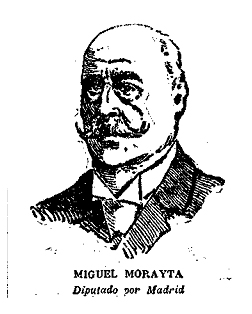 Retrato de Miguel Morayta y Sagrario.